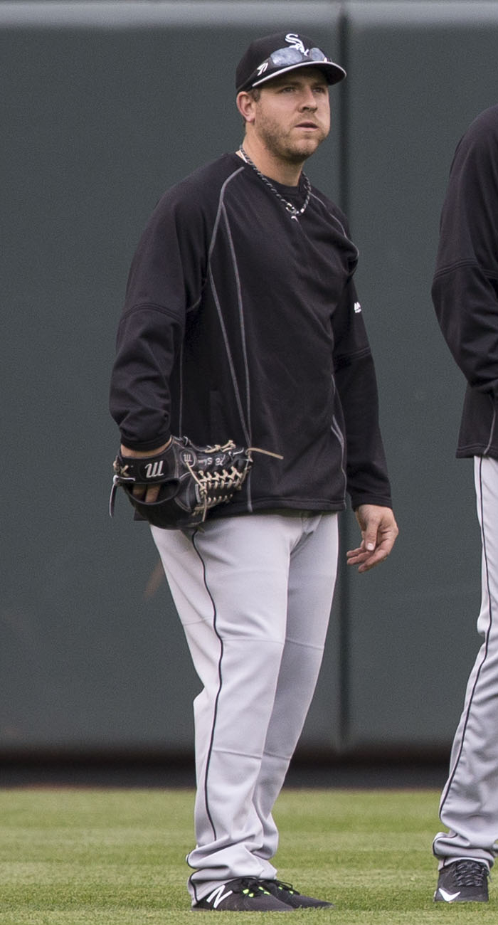 JB Shuck